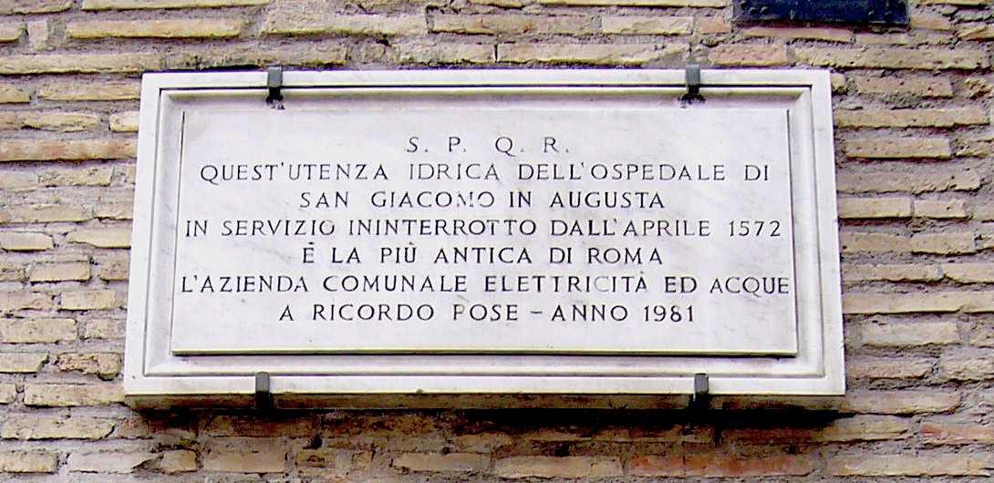 Targa che attesta il primato dell'Ospedale di potenza idrica più antica di Roma